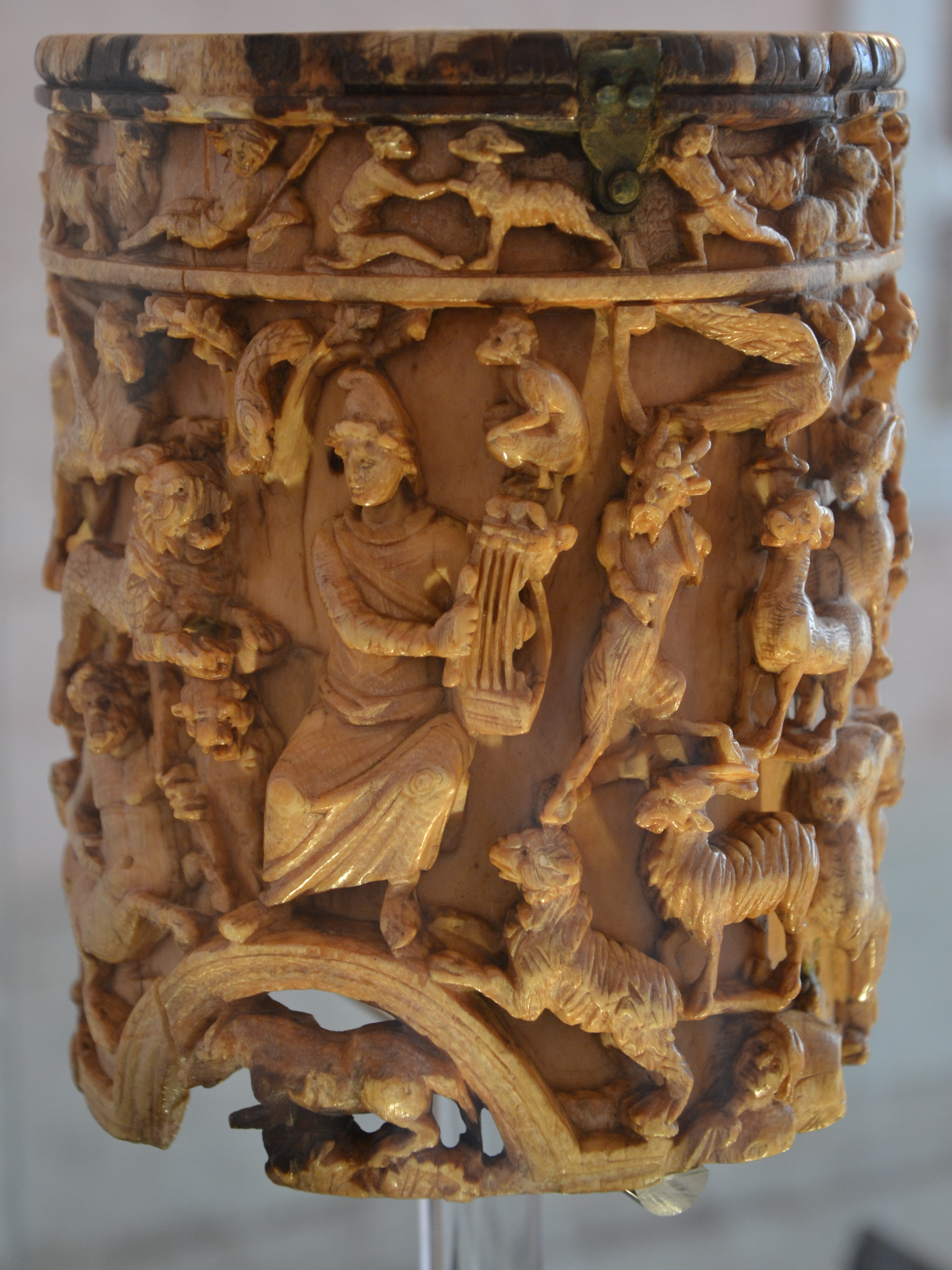 Museo dell’Abbazia di San Colombano, Bobbio, preziosa teca d’avorio di finissima fattura, detta Teca di Orfeo, ricavata in una grande zanna d’elefante e raffigurante Orfeo nell’atto di ammansire gli animali, databile tra il II e il V secolo.